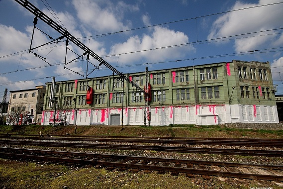 Budova MeetFactory.